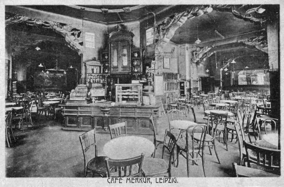 Cafè Merkur in Leipzig, um 1920